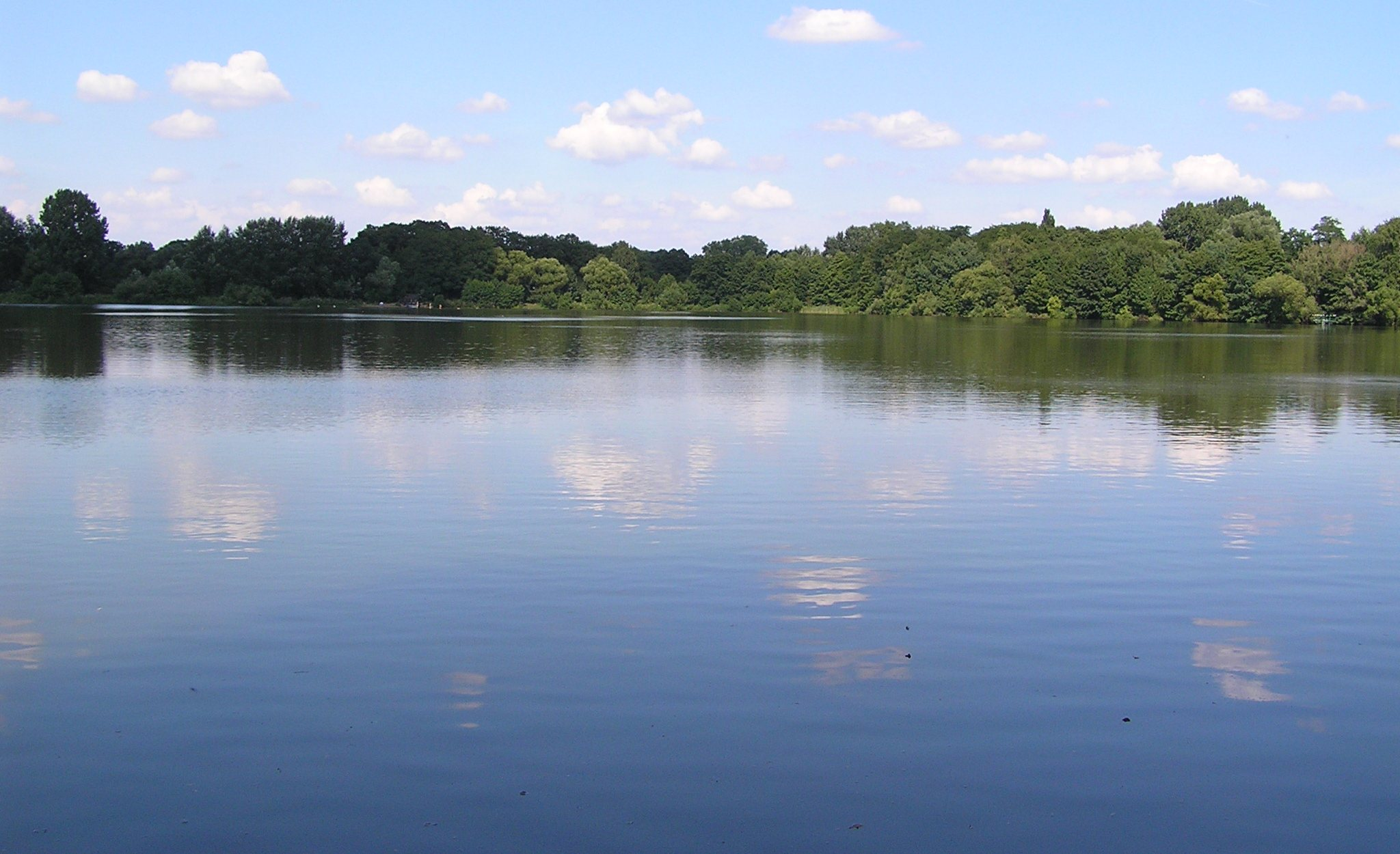 Lake "Blauer See", Dorsten